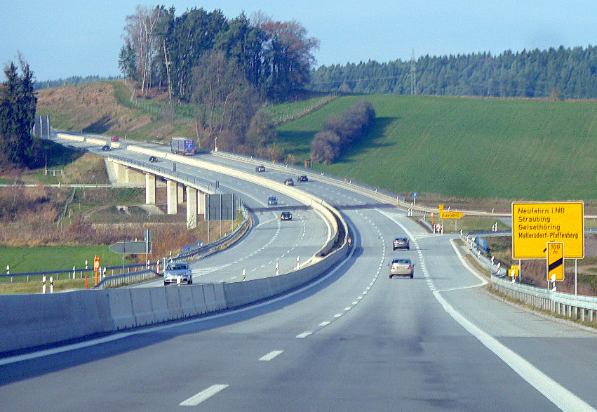 B15 neu in Fahrtrichtung Regensburg - Ausfahrt bei Neufahrn i. Nb.